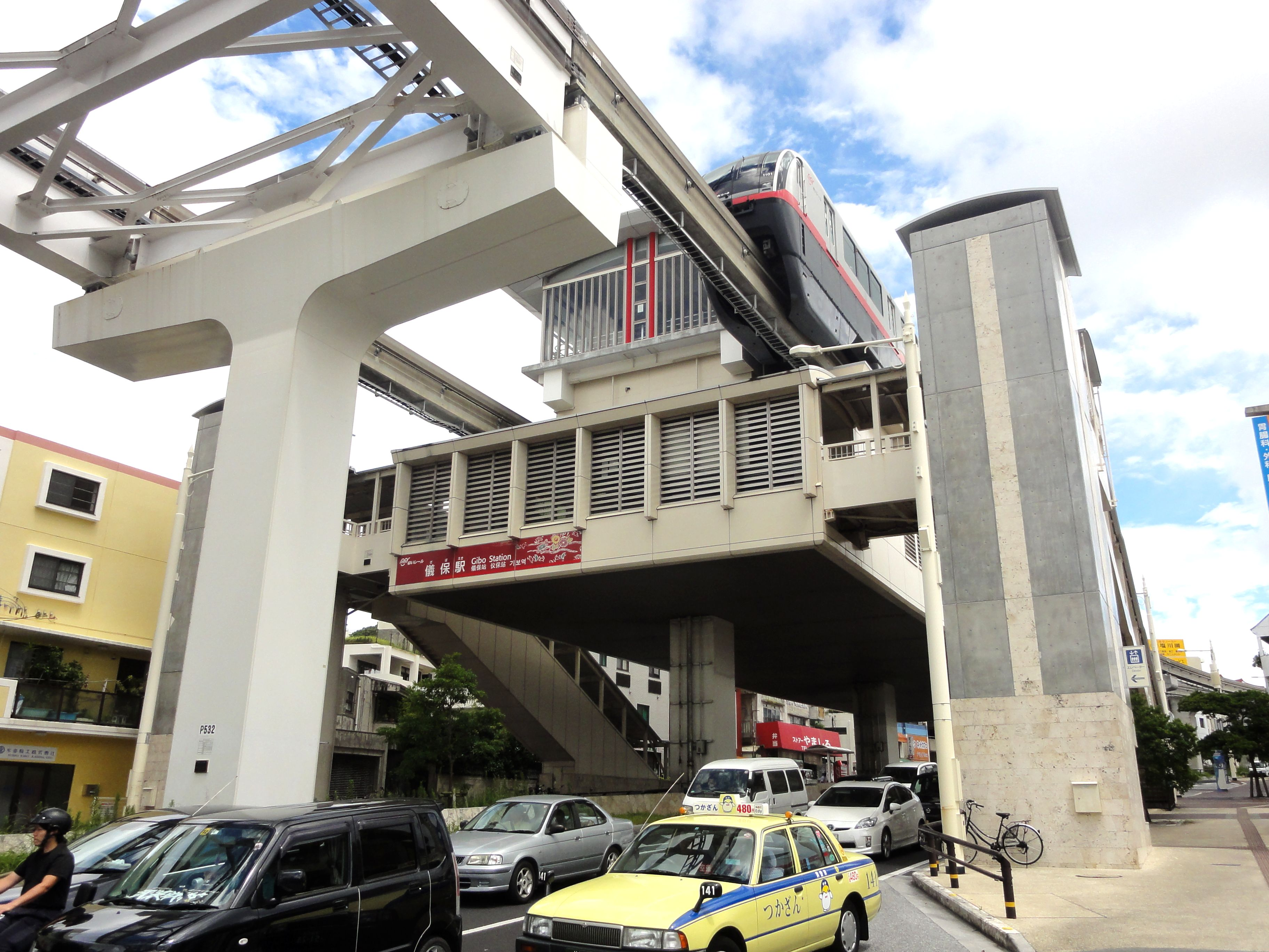 沖縄都市モノレール儀保駅